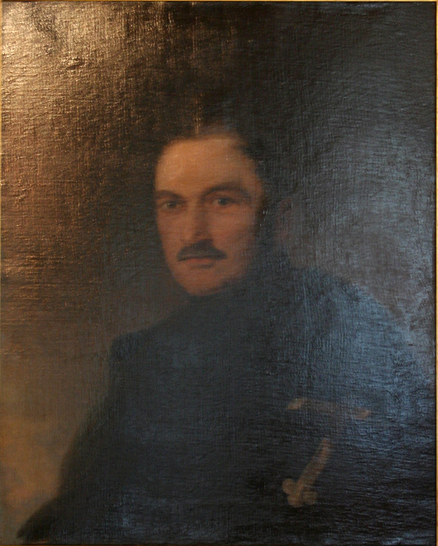 Portret Wincentego Krasińskiego (1782-1858), eksponat w Muzeum Regionalnym im. Zygmunta Krasińskiego w Złotym Potoku